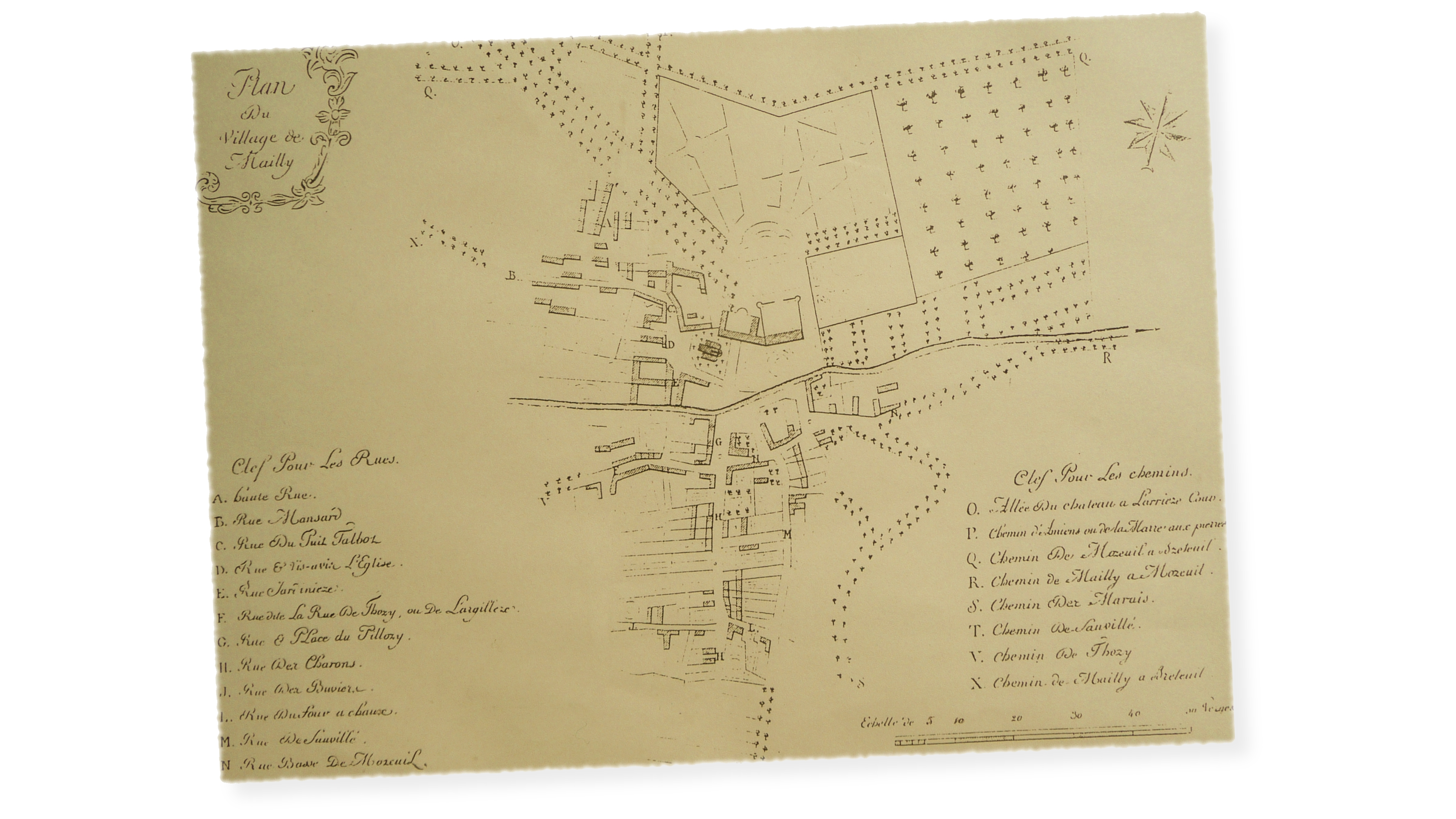 Plan Mailly-Raineval 1763